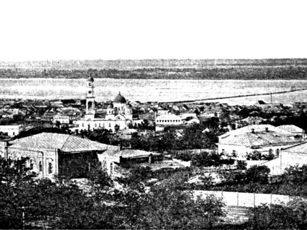 Панорама Екатриронслава. Одно их первых фото города